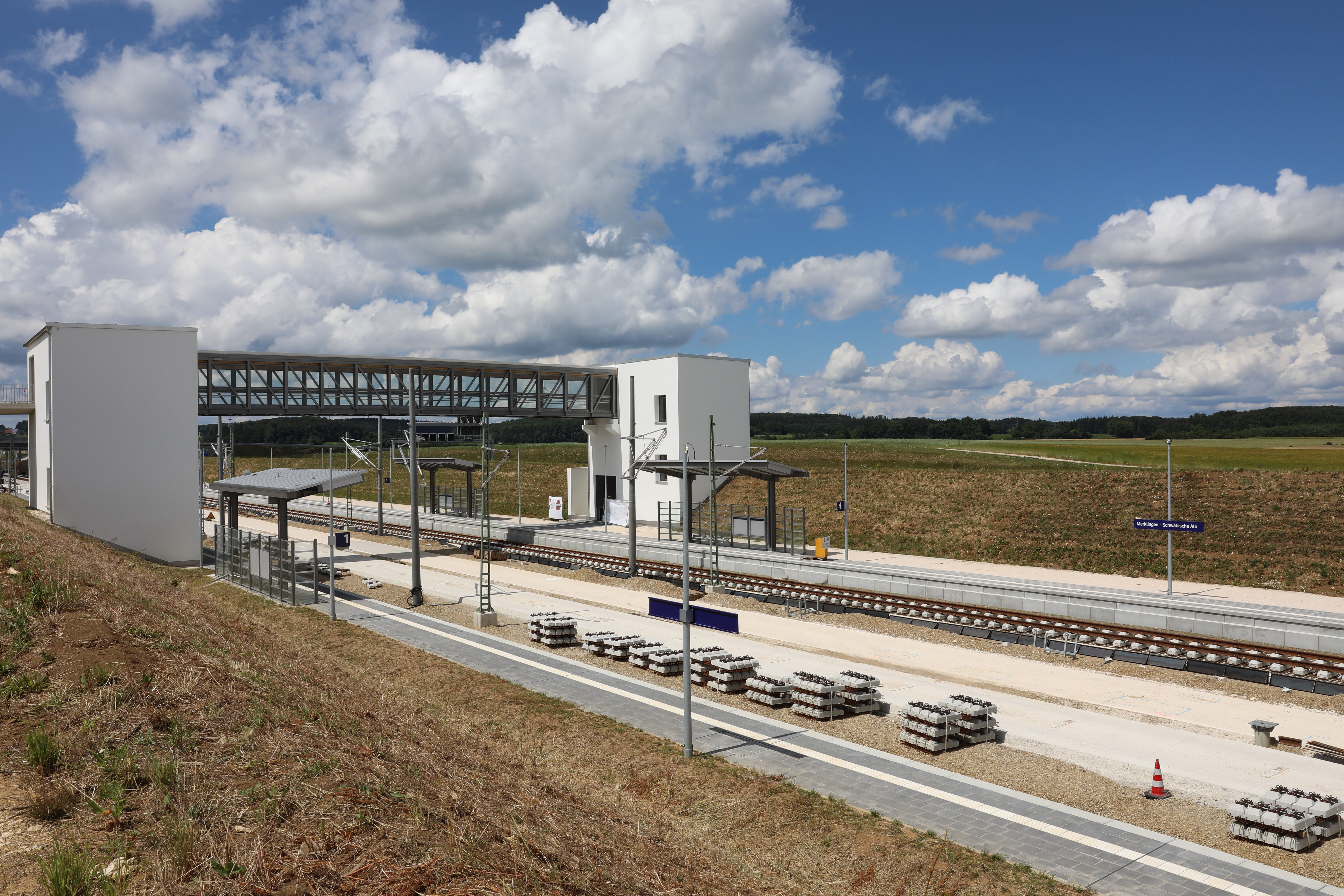 Bahnhof Merklingen im Bau